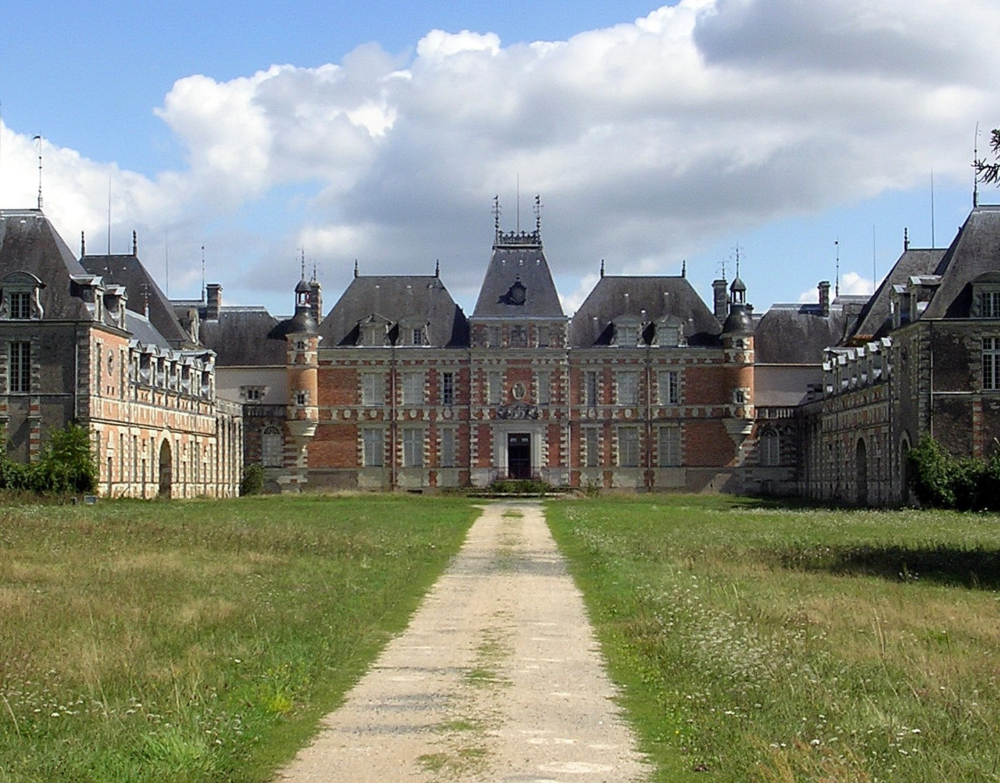 Château de Clermont au Cellier (Loire Atlantique, France)